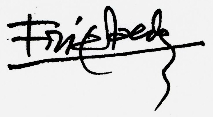 Signature du graveur Johnny Friedlaender.